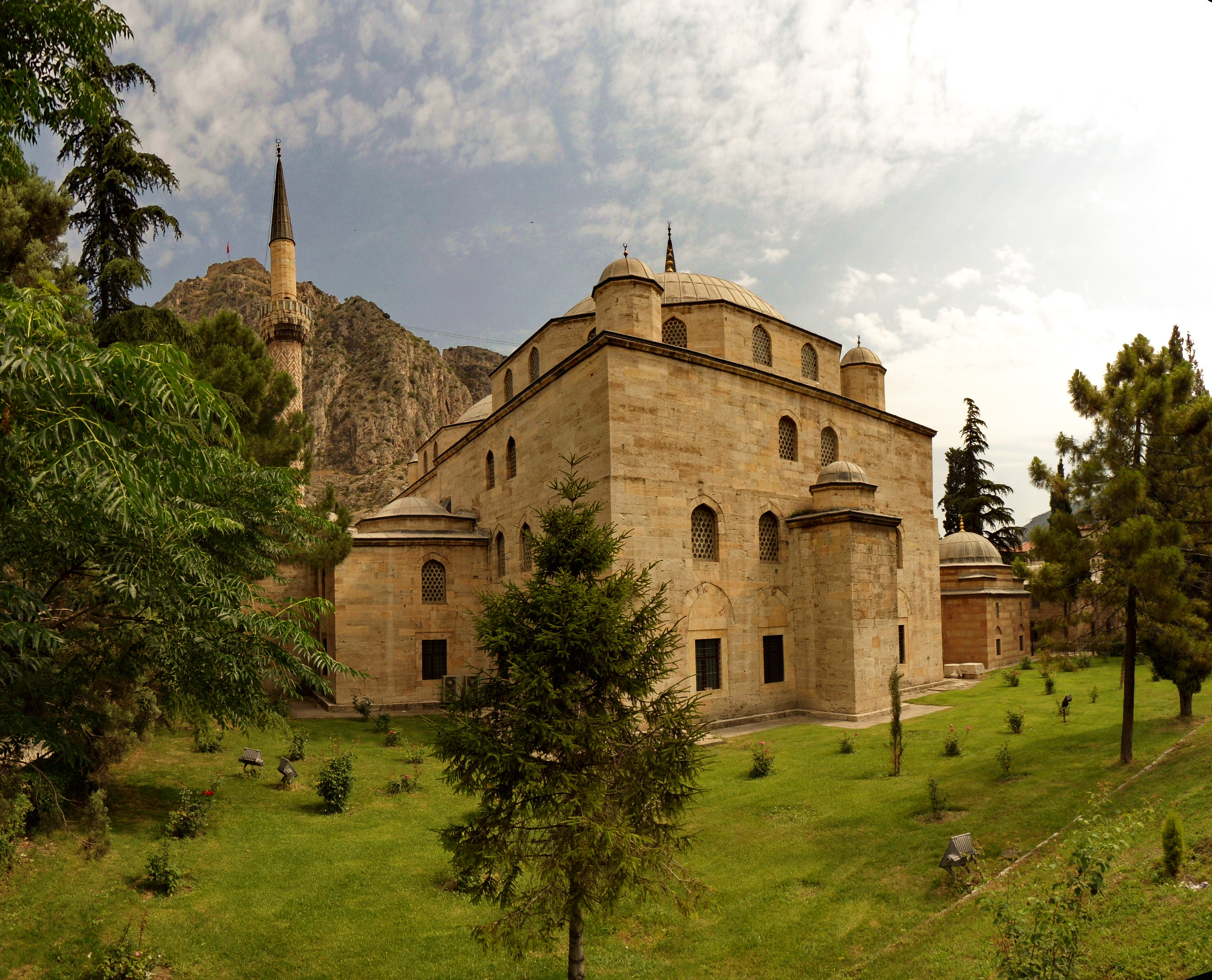 Amasya